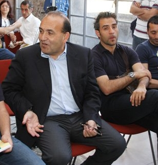 Damiano Paletta e Domenico Toscano